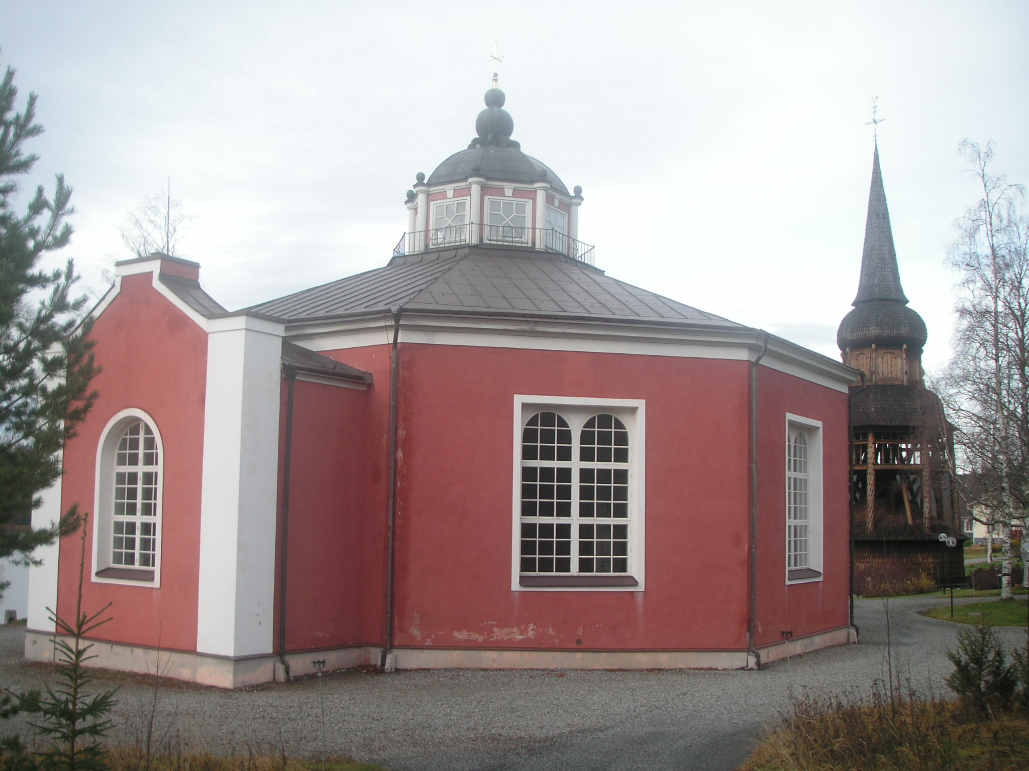 Hällesjö kyrka och klockstapel i Bräcke kommun, Jämtland